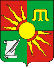 Герб Заинского района, Татарстан. Утверждён решением Совета Заинского муниципального района (#99) от 26 декабря 2006 года.